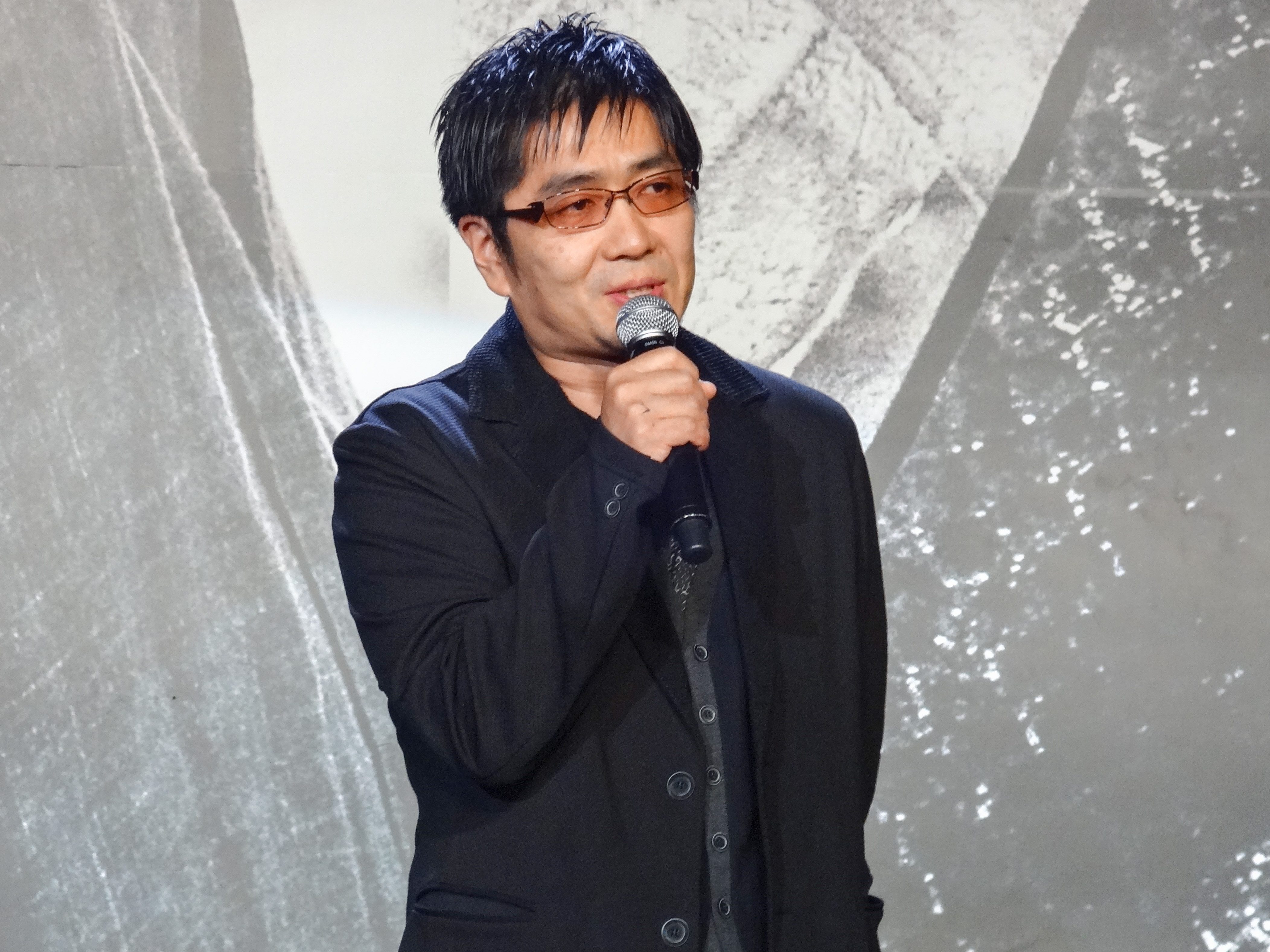 るろうに剣心 京都大火編/伝説の最期編 レッドカーペット 大友啓史 監督